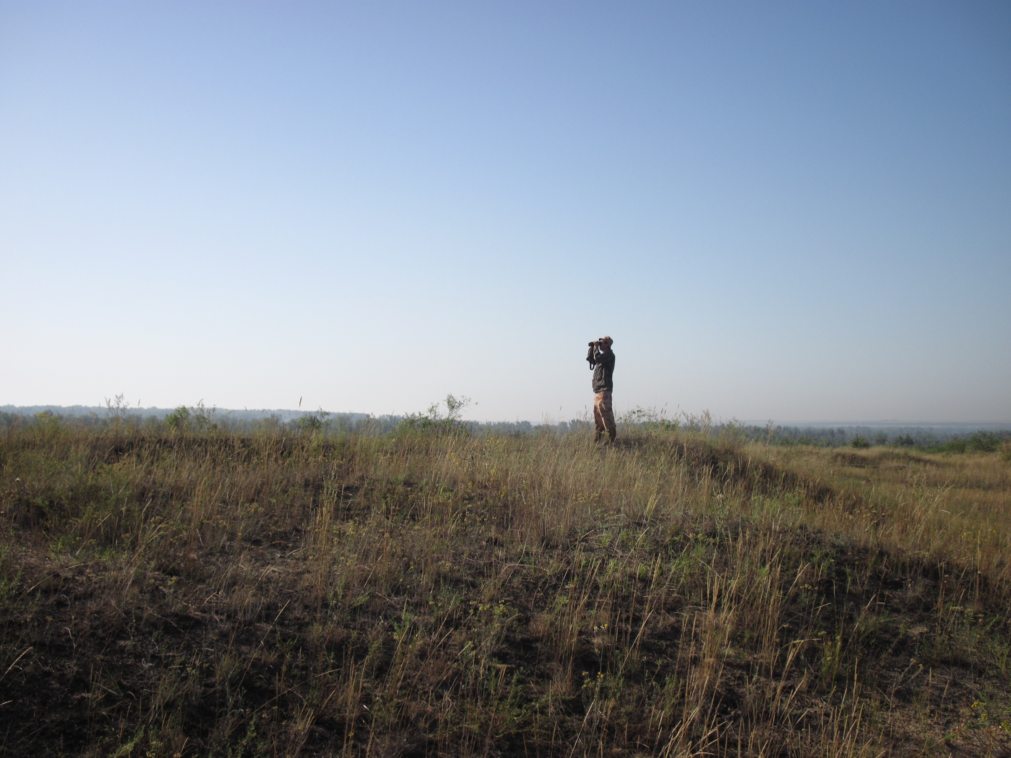 у заповіднику Трьохізбенський степ (фото пейзажу з людиною)